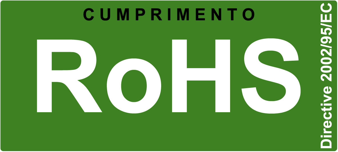 RoHS Restriction of Hazardous Substances Directive icona